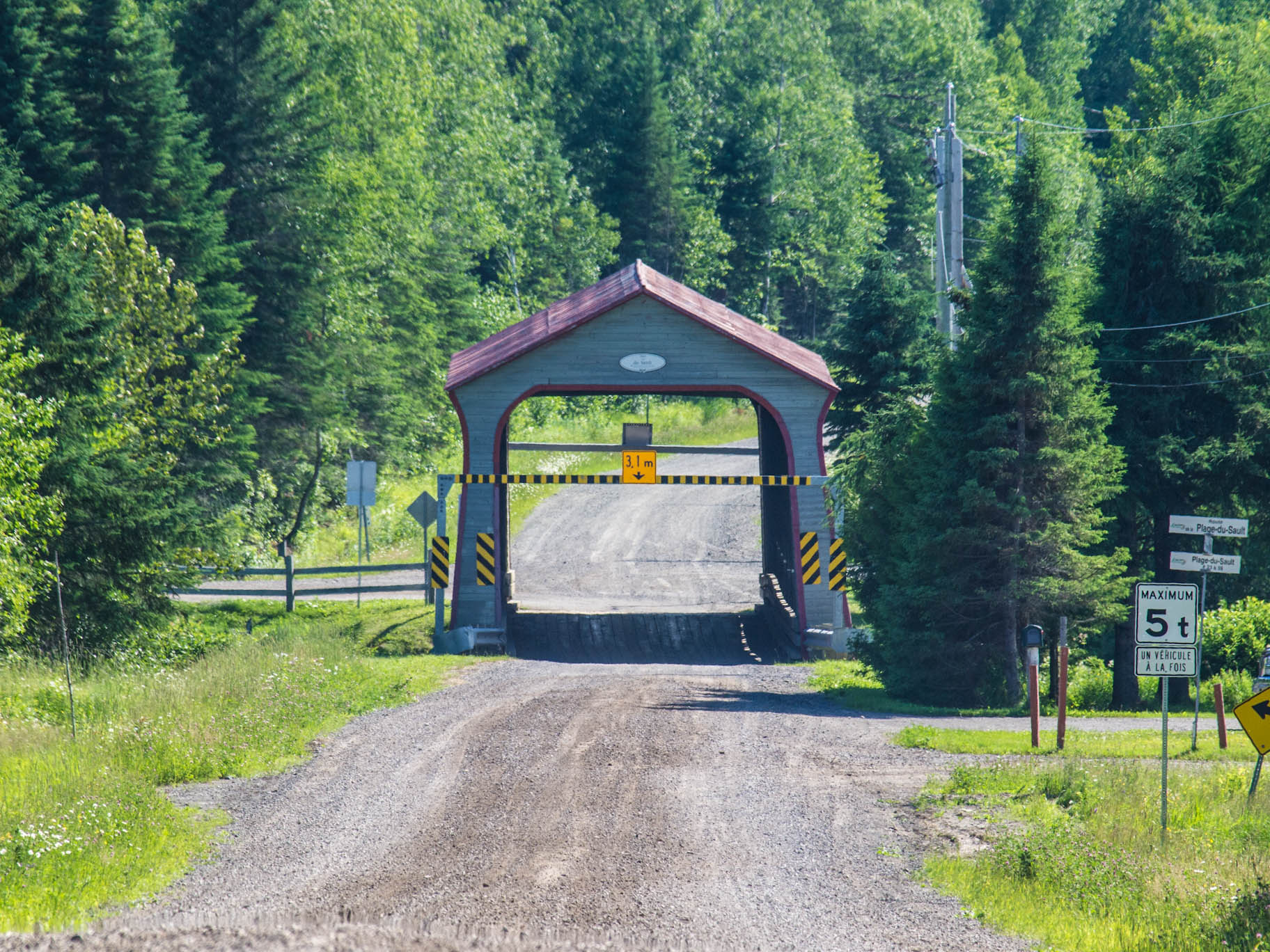 Pont du Sault, St-Adalbert,QC